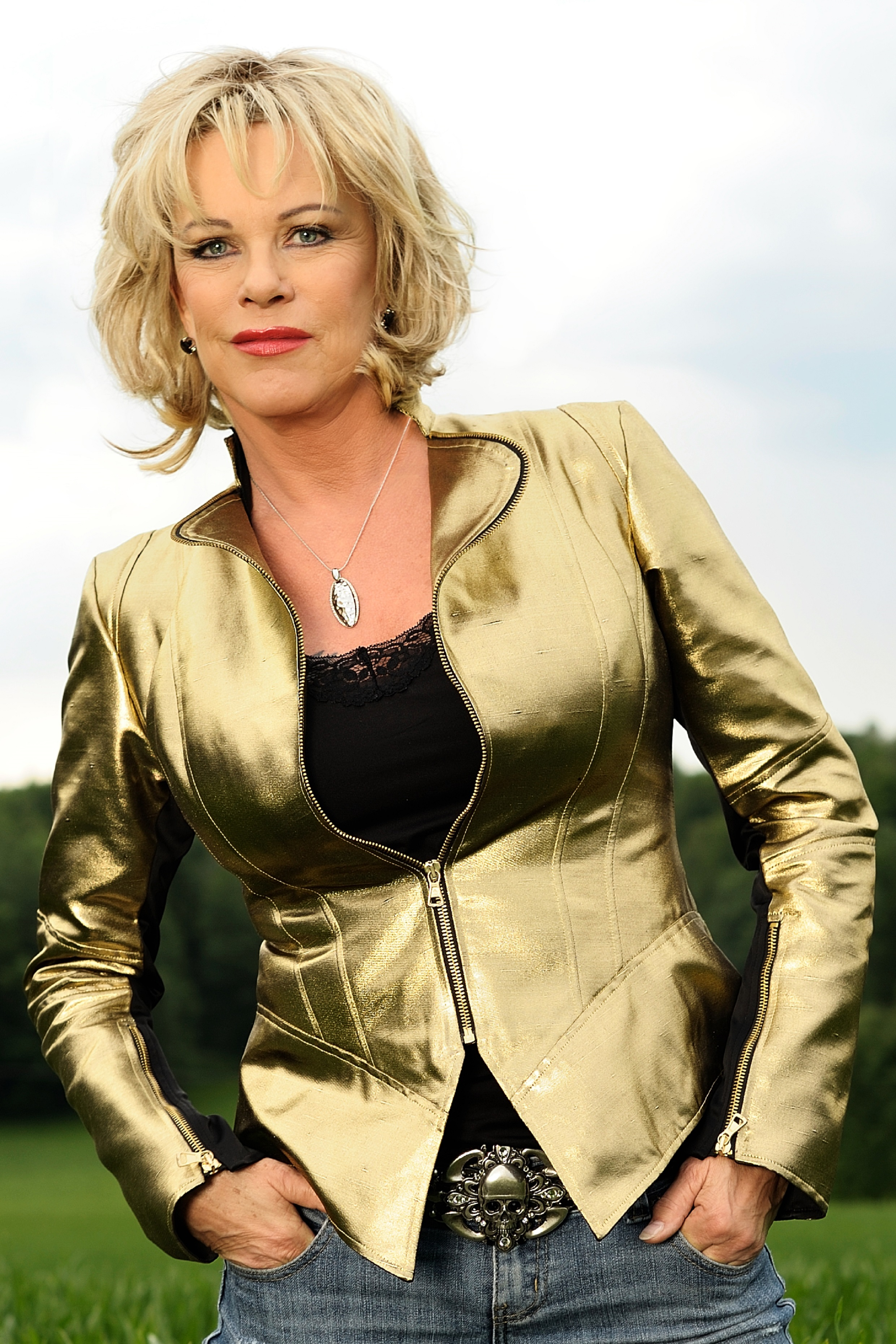 Fotos Lisa Fitz